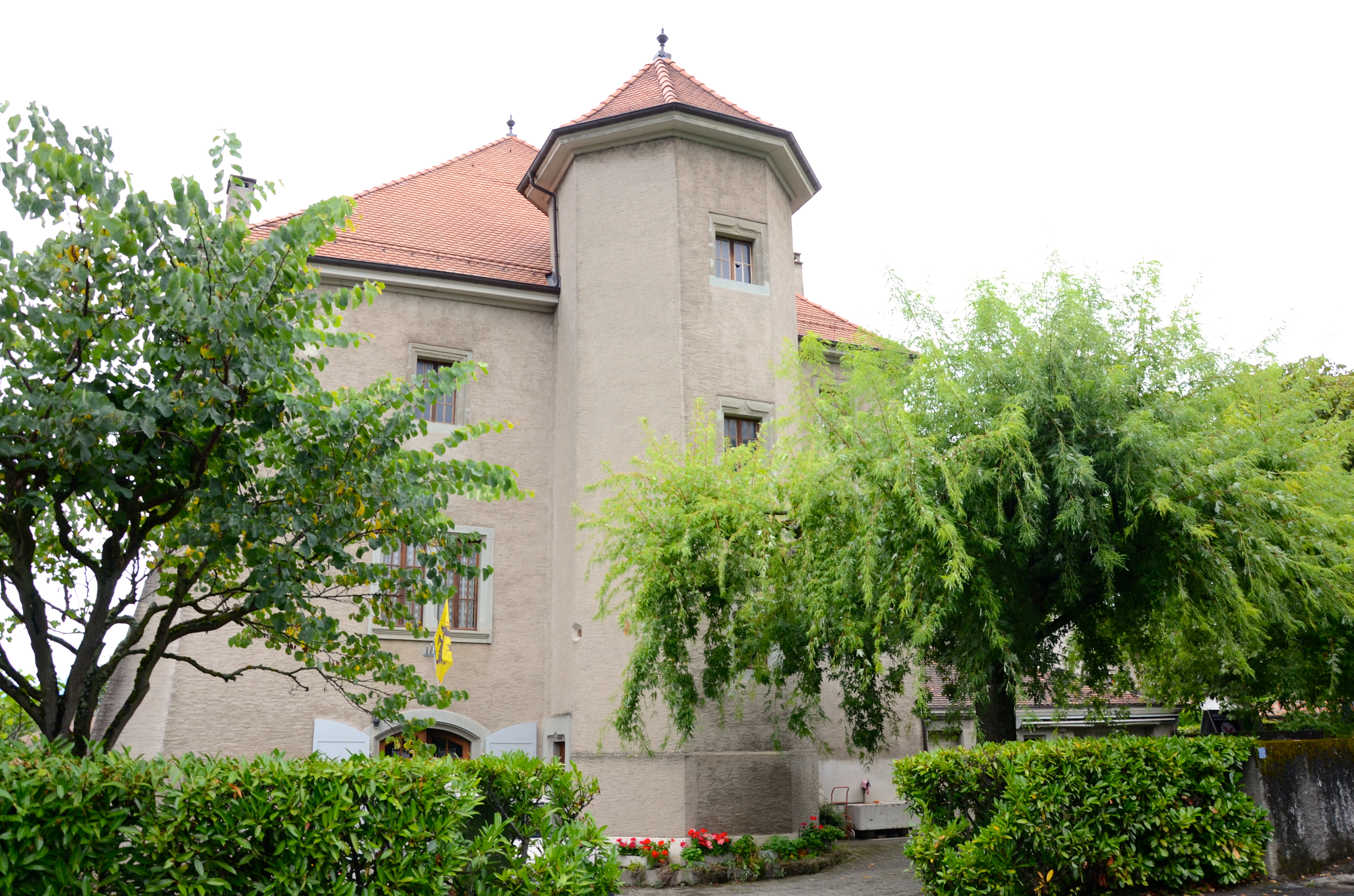 Festes Haus, Route des Rupettes 16, Laconnex, Genf